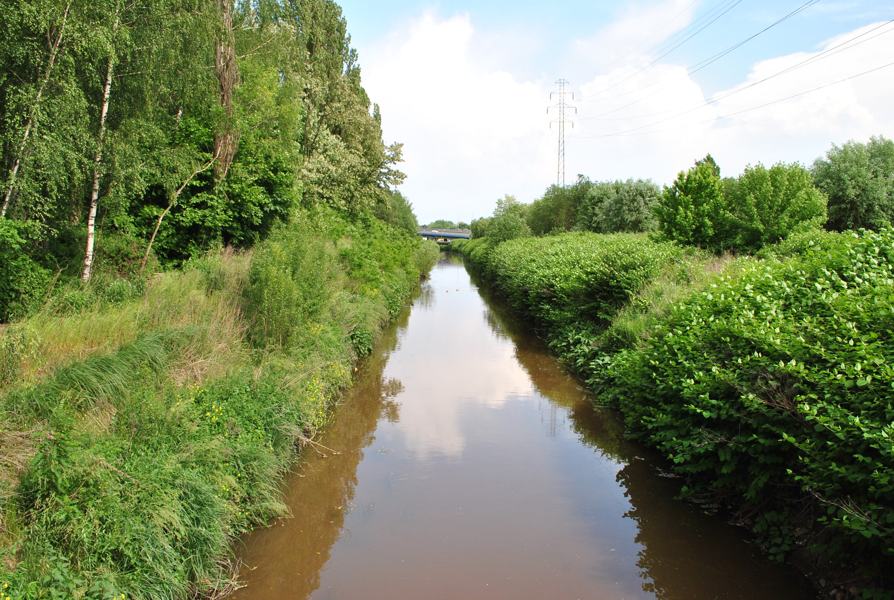 Rawa na wysokości kładki dla pieszych w pobliżu stawów na Tysiącleciu w Katowicach